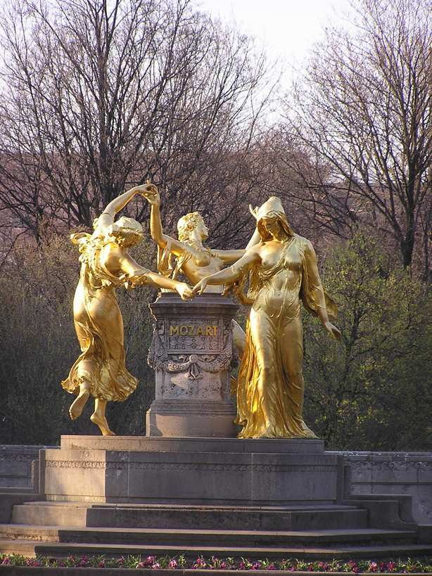 Dresden, Denkmal Wolfgang Amadeus Mozart. Von Hermann Hosaeus, 1907